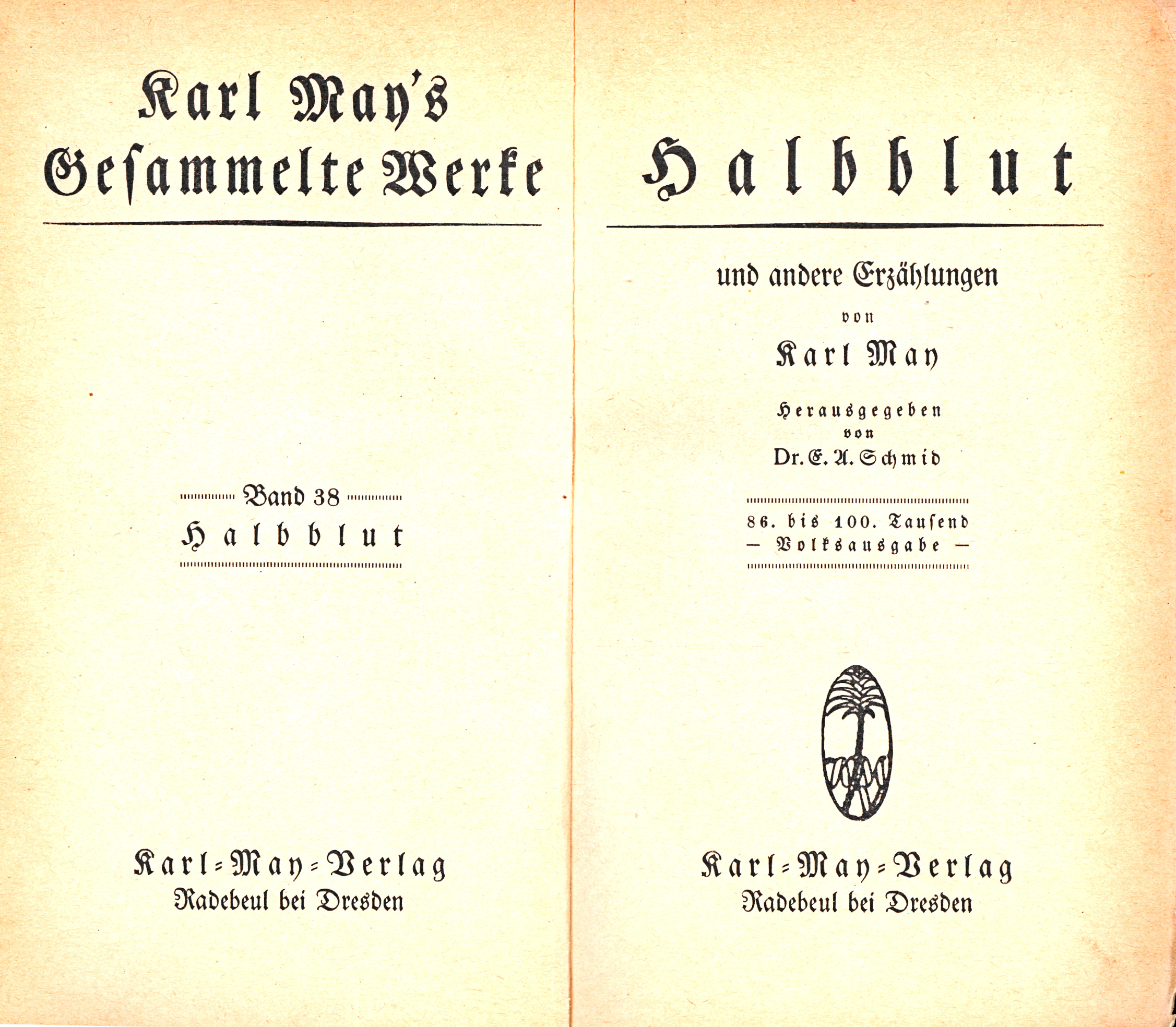 Karl May, Gesammelte Werke, Band 38, Halbblut, Karl-May-Verlag, Radebeul bei Dresden, 1916